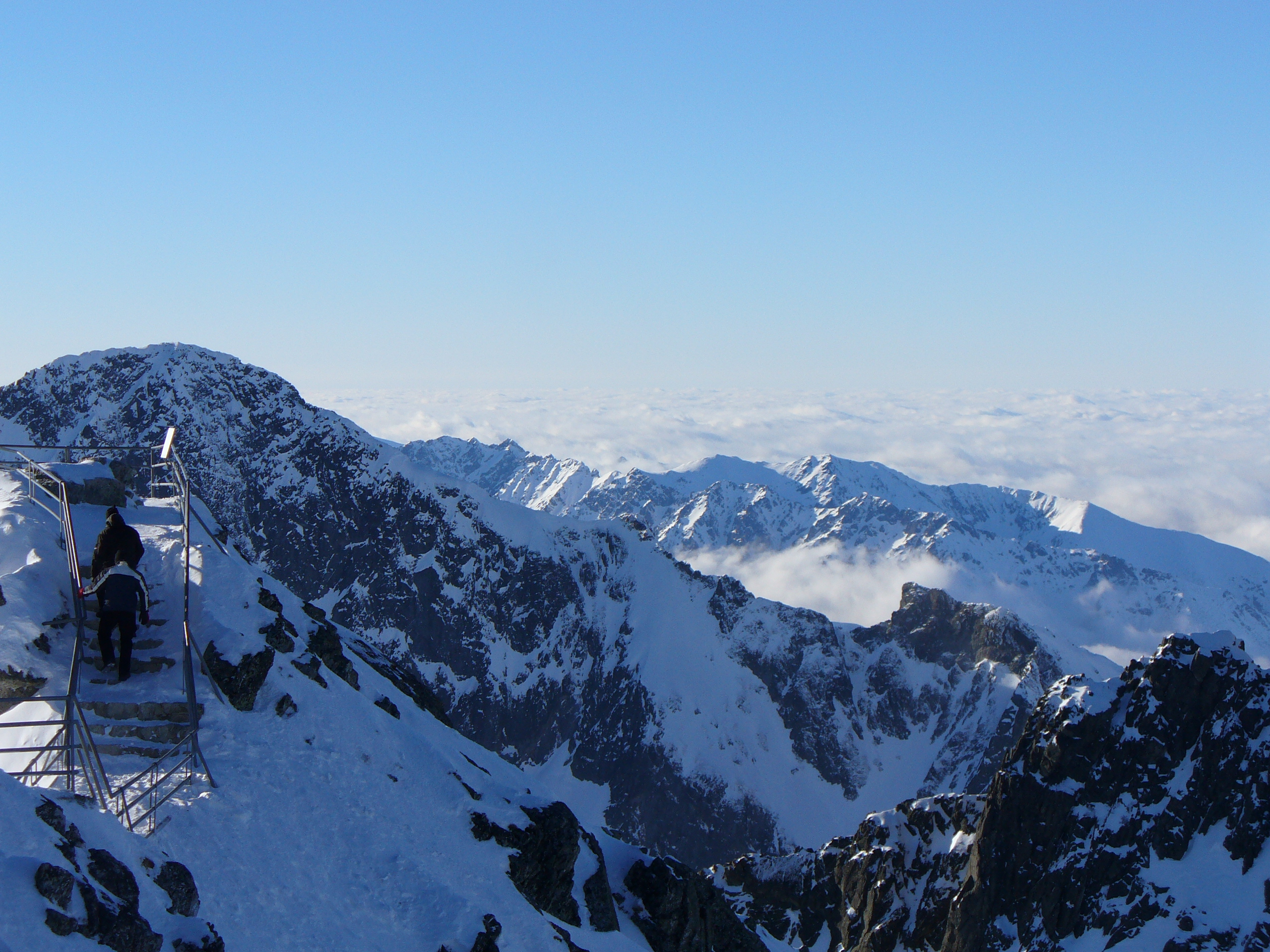 Widok z Łomnicy na masyw Lodowego Szczytu i Śnieżny Szczyt